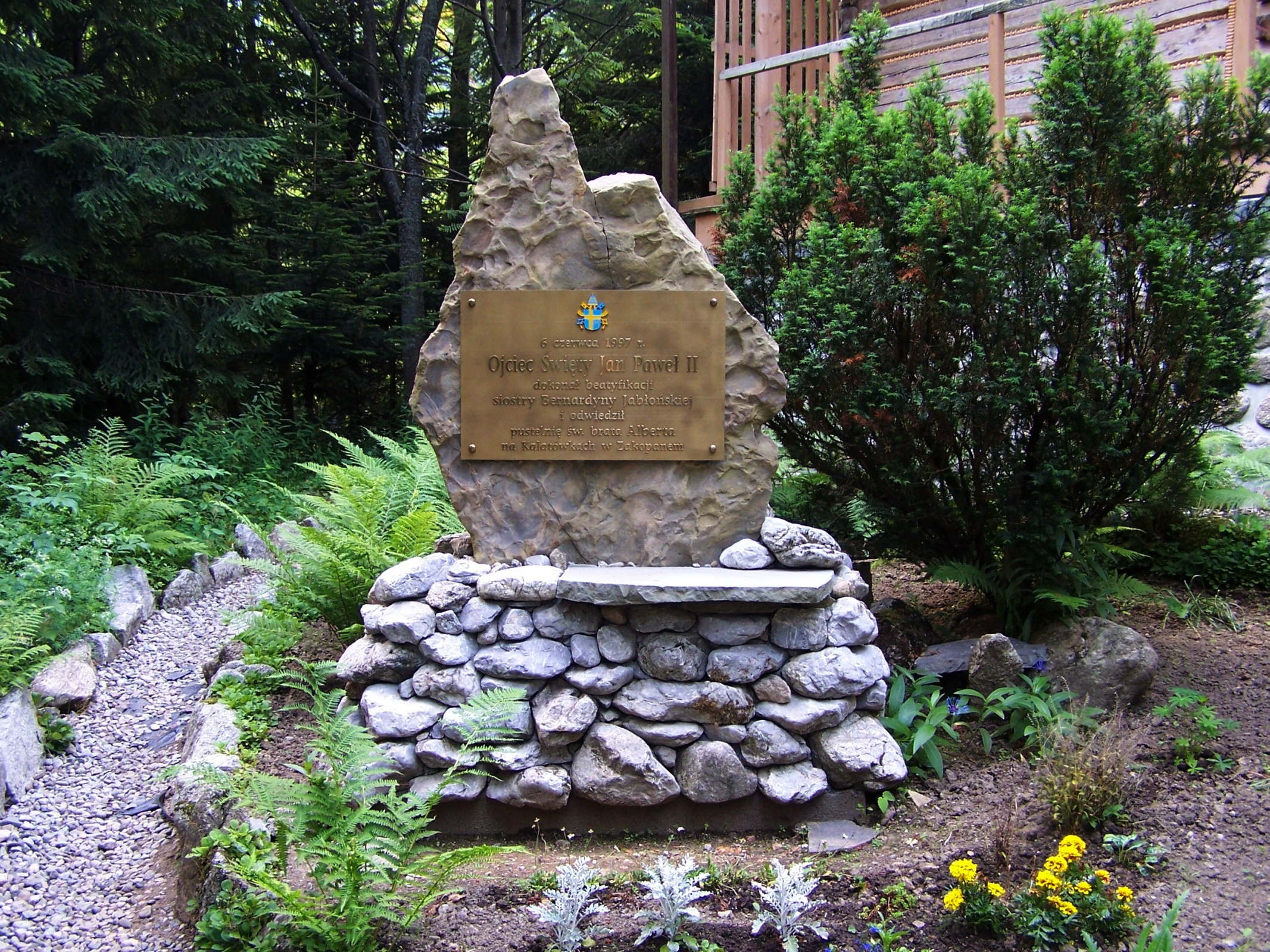 Pamiątkowy obelisk Jana Pawła II przy Klasztorze Albertynek na Kalatówkach w Zakopanem